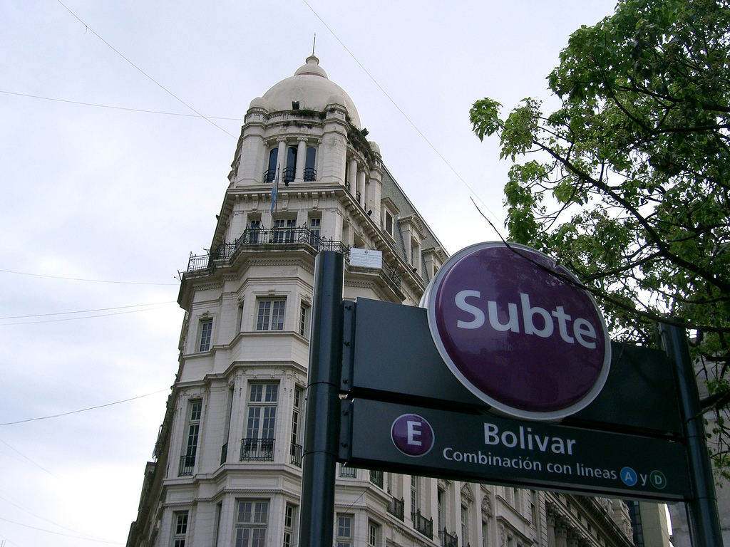 Boca de acceso a la estación Bolívar del subterráneo porteño